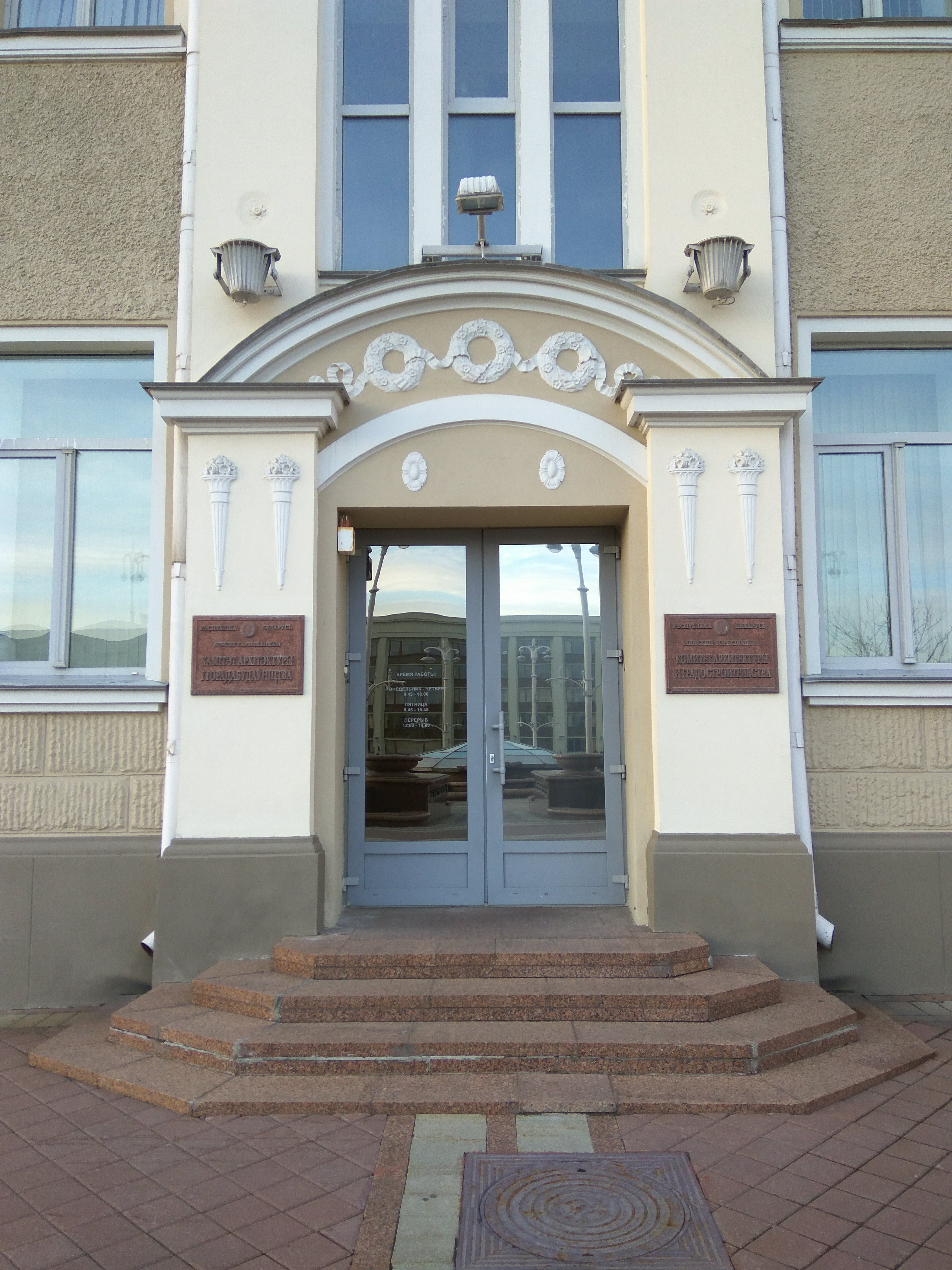 Мінск. Савецкая вуліца (плошча Незалежнасці)